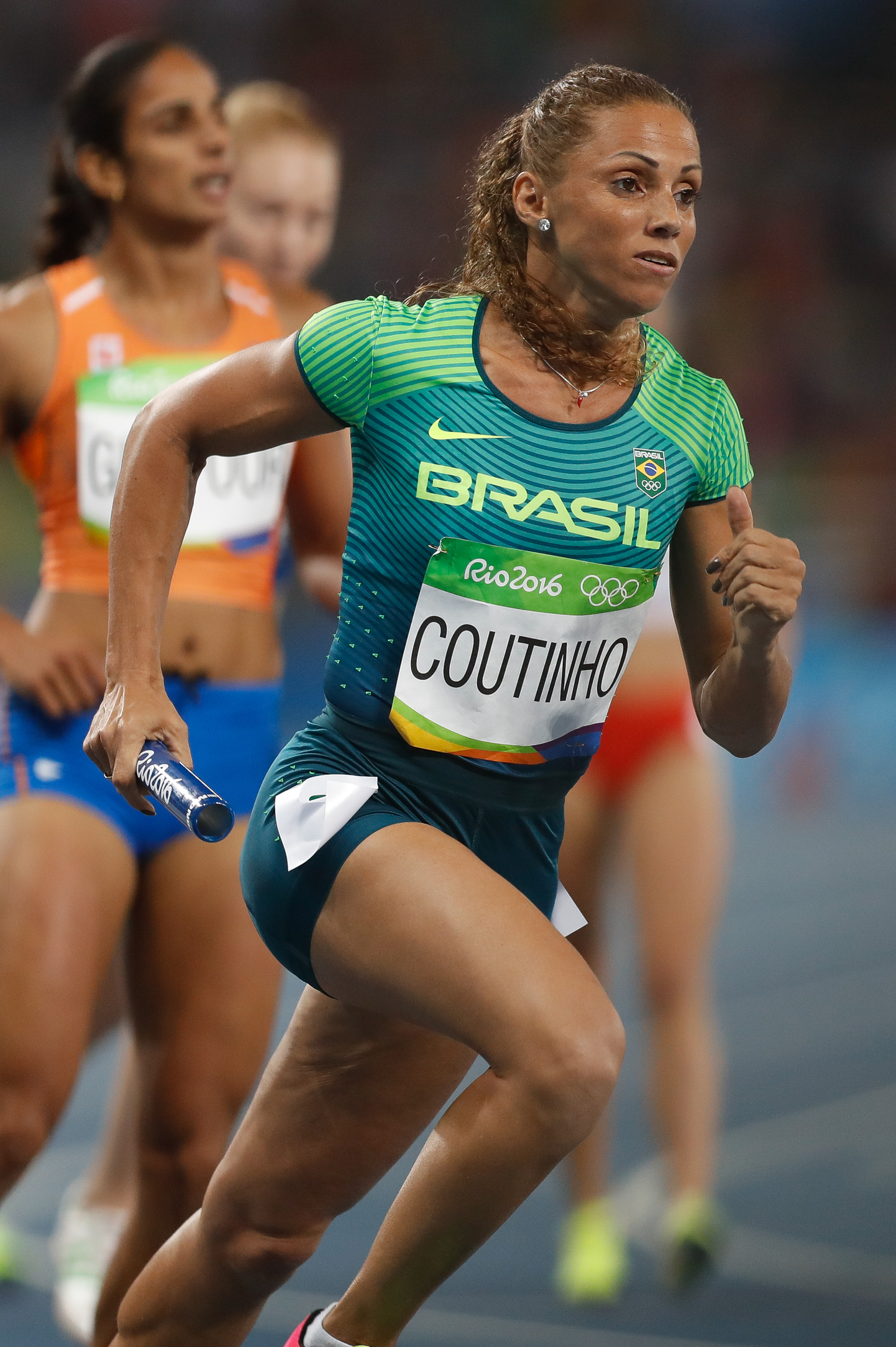 Rio de Janeiro - Eliminatórias do revezamento 4 x 400m nos Jogos Rio 2016, no Estádio Olímpico (Fernando Frazão/Agência Brasil)